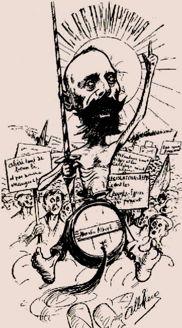 Marcellin Albert en Don Quichotte